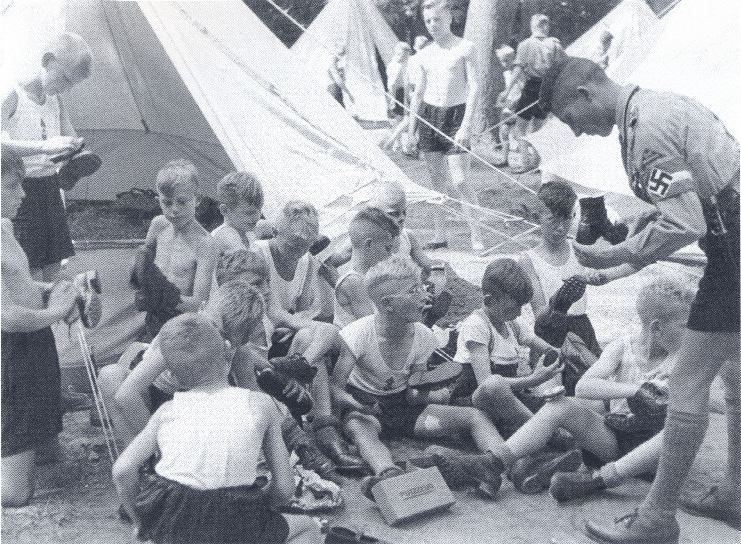 HJ im Ferien-Zeltlager Espohl bei Lemförde